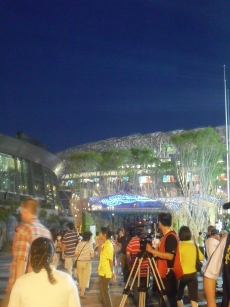 中文（台灣）: 2009台北聽奧開幕式在台北田徑場舉行，圖為當晚西區入口處景象。